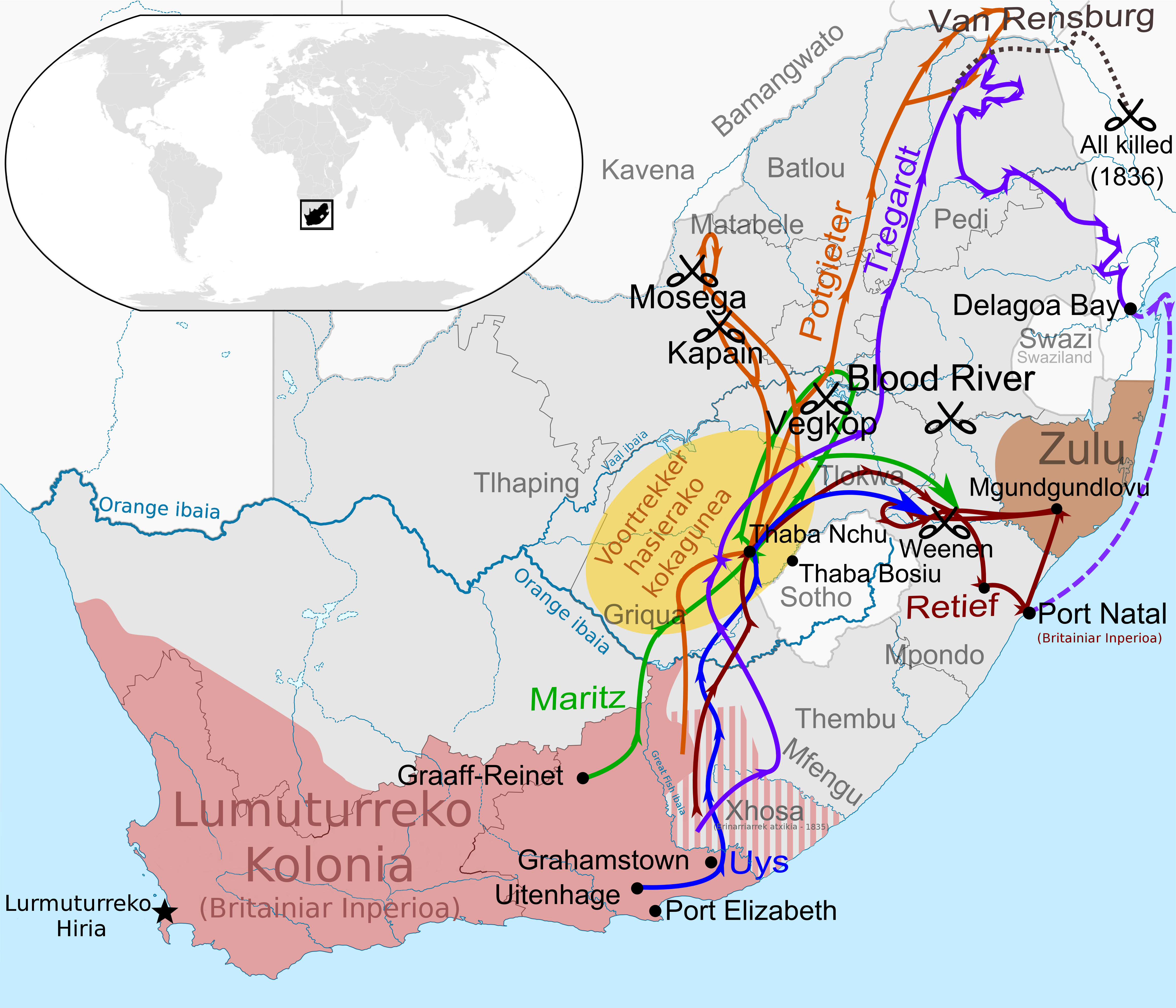 Trek Handiaren (1835-1840) ibilbideak erakusten duen mapa.